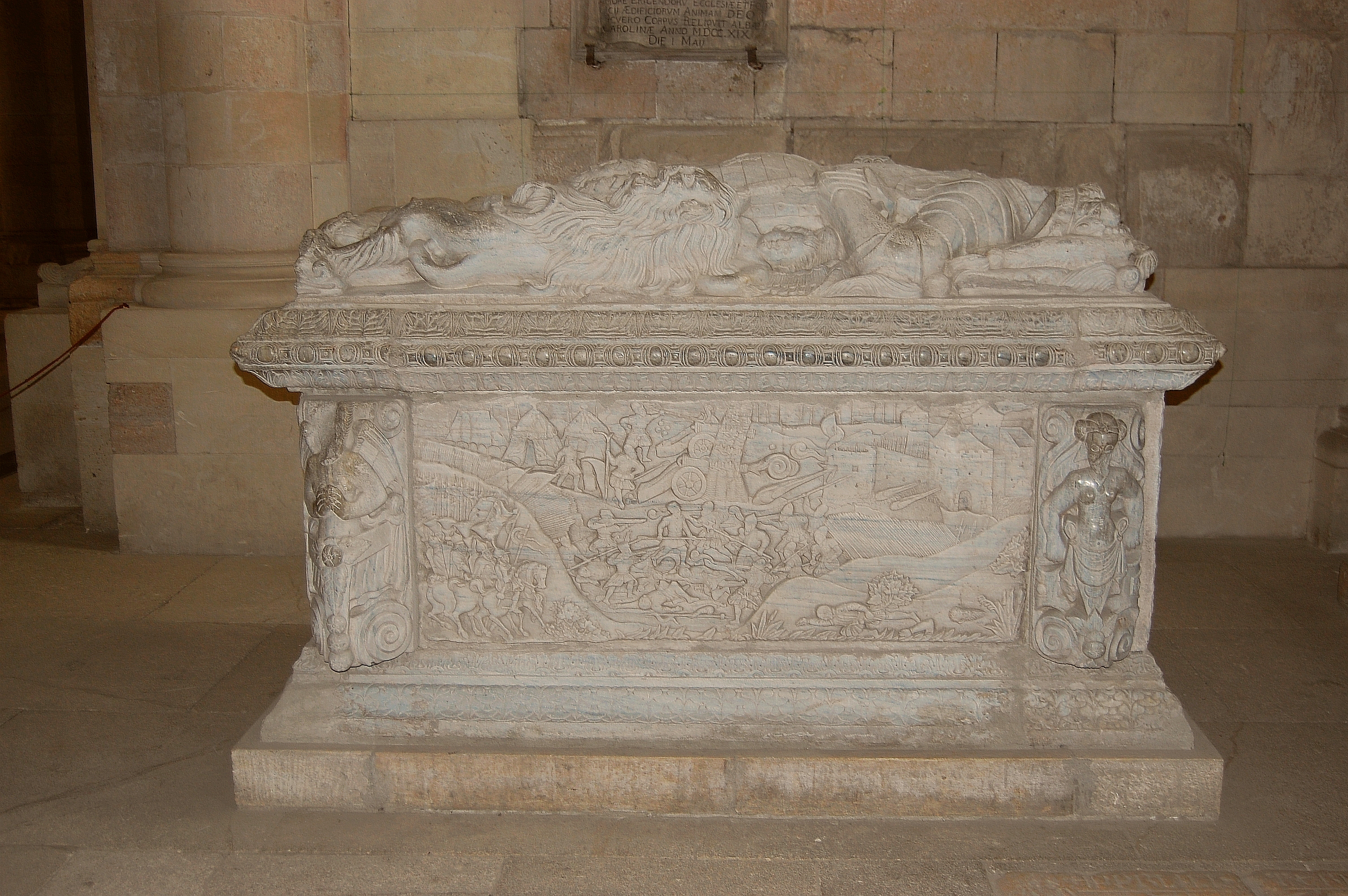 Gyulafehérvár, Szent Mihály Székesegyház - János Zsigmond szarkofágja